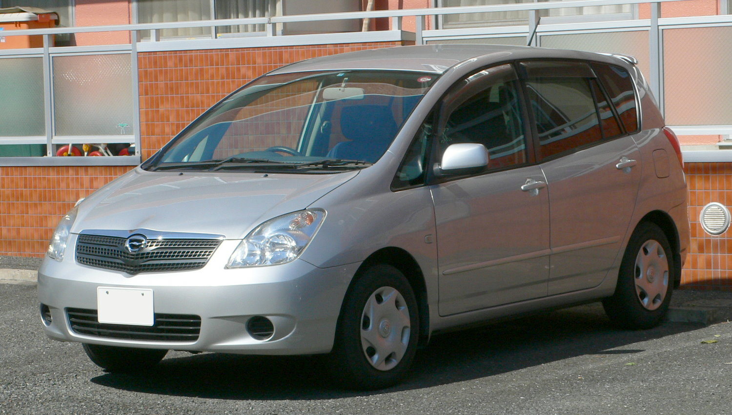 2nd generation Toyota_Corolla Spacio (2001/5 - 2003/4)